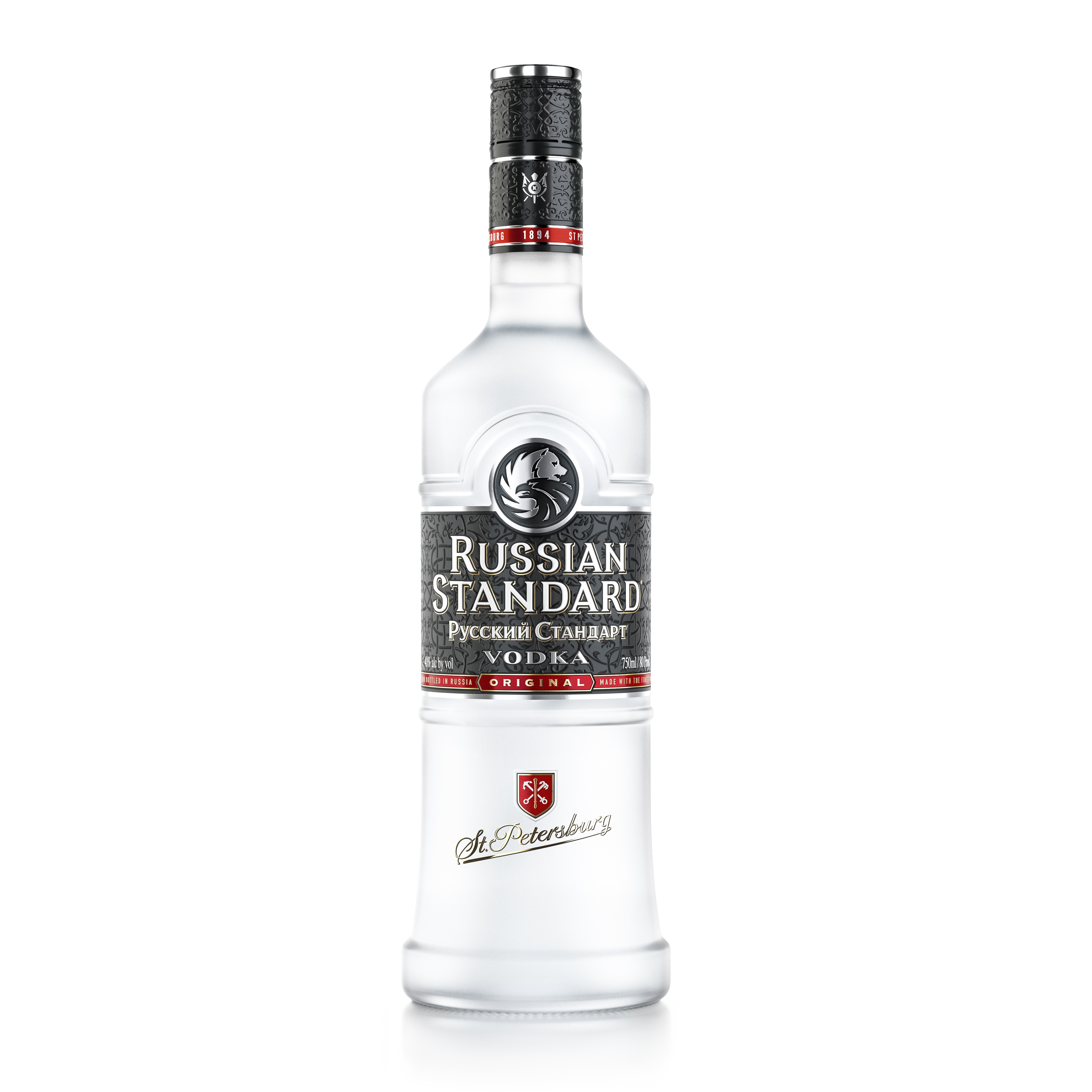 תמונת בקבוק רוסקי סטנדרט וודקה